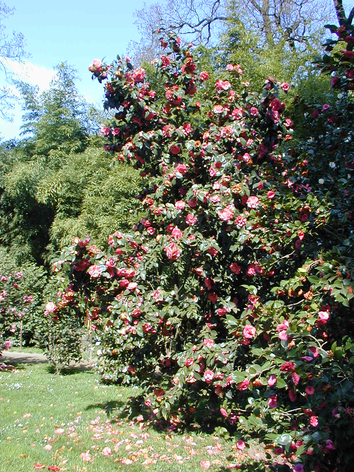 Camellia Japonica, à la Bambouseraie de Prafrance à Anduze (Gard)